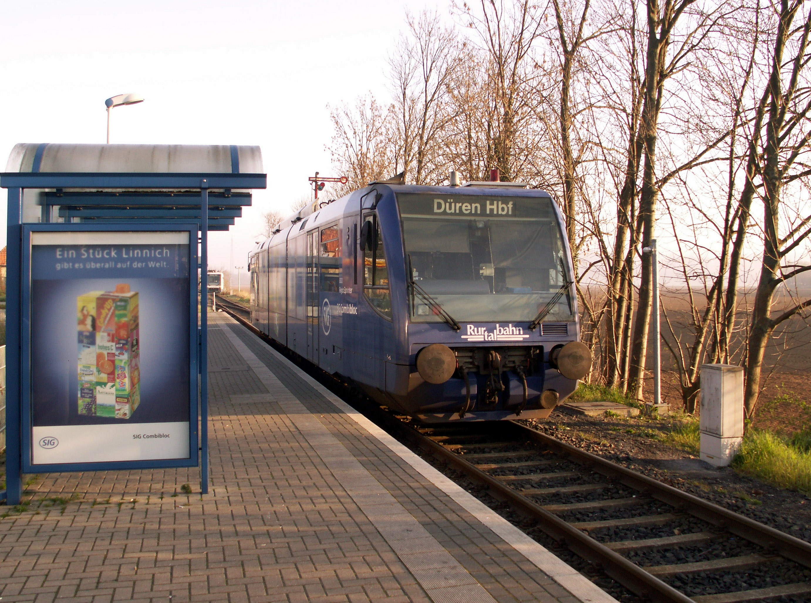 Bf Linnich, 2002 reaktiviert